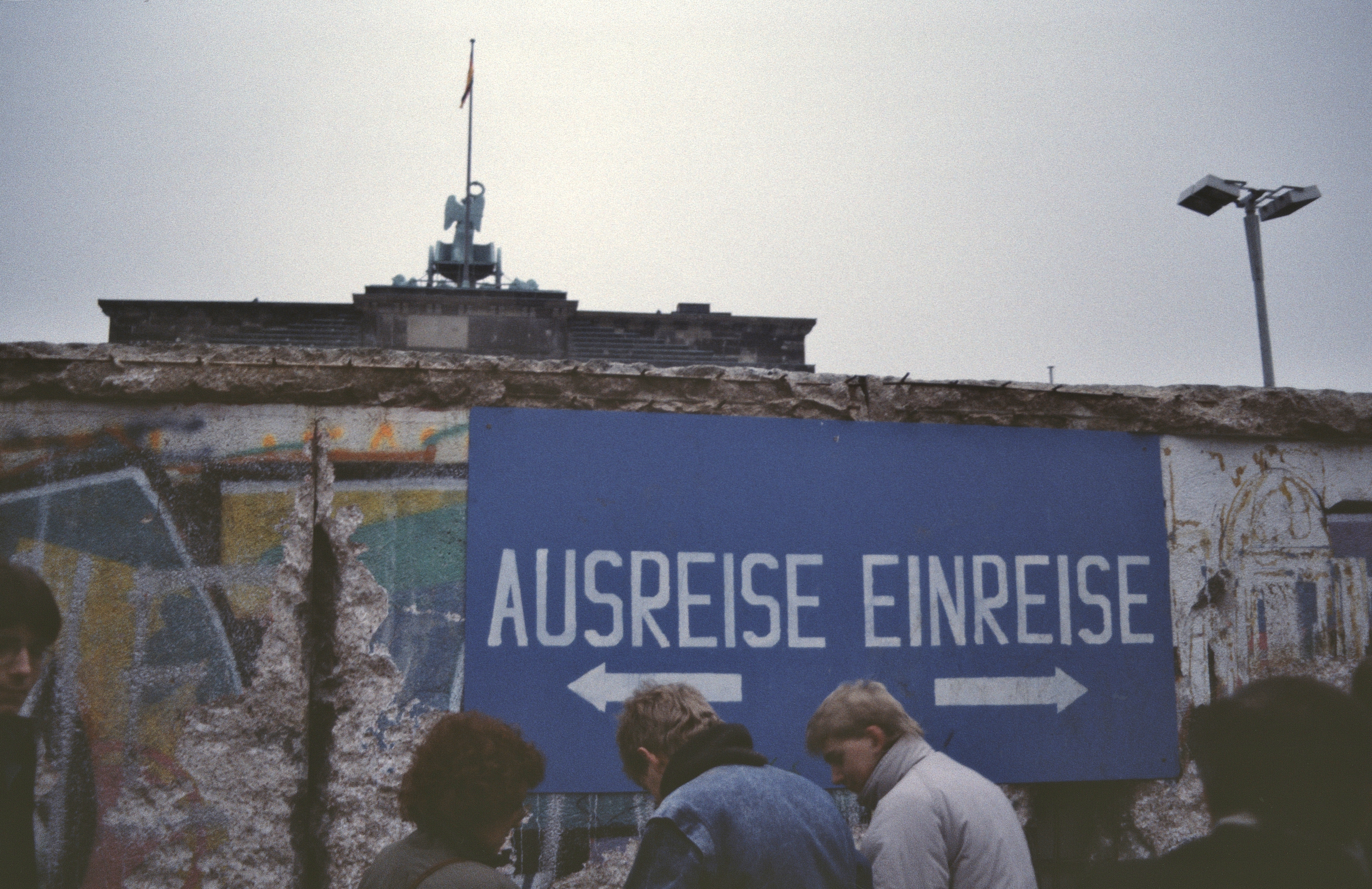 Hinweisschild Einreise/Ausreise an der Berliner Mauer am Brandenburger Tor